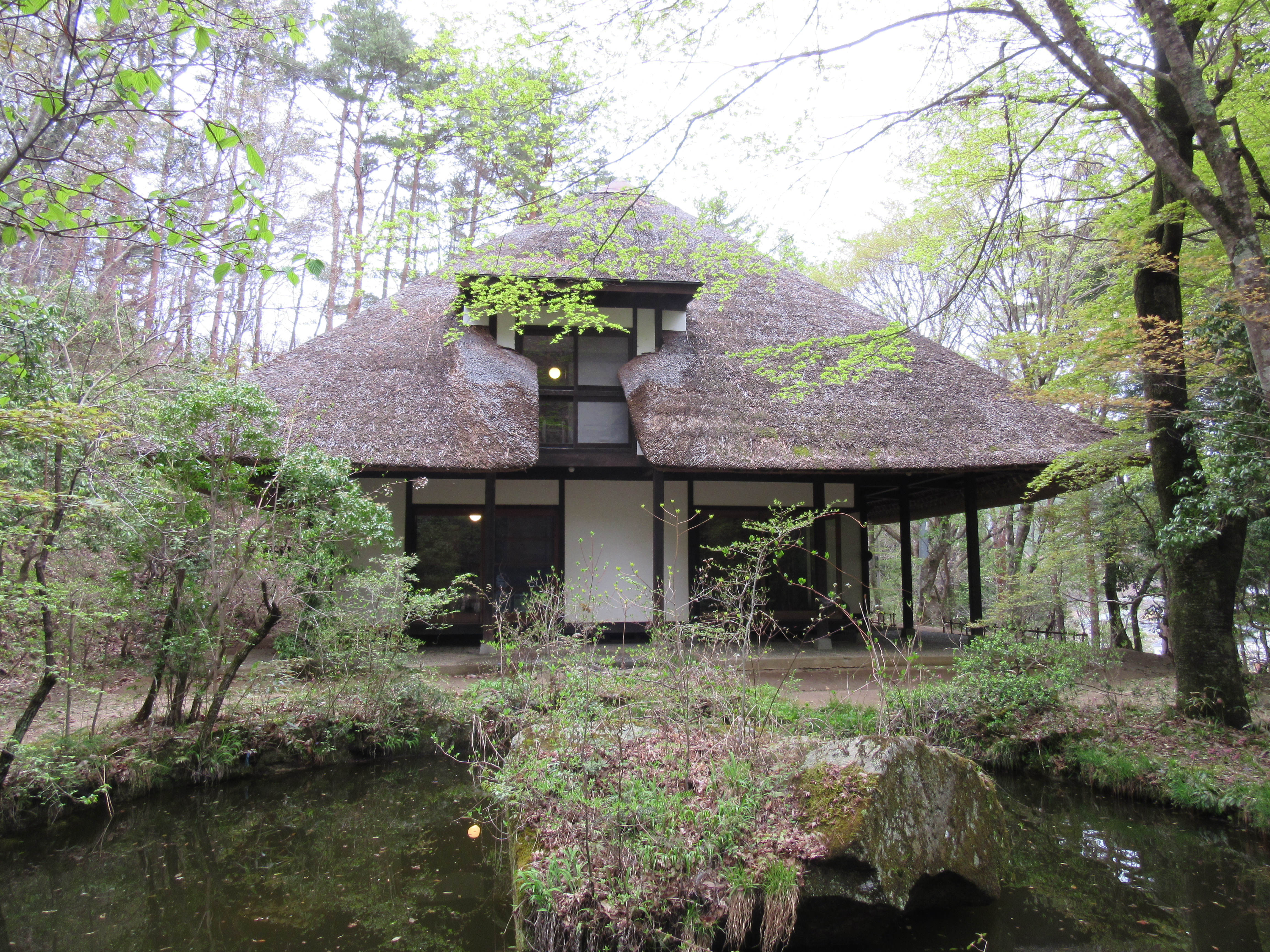 天山文庫。 Canon PowerShot SX600 HS